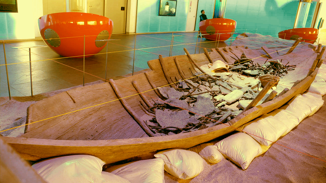 Reconstrucción del pecio fenicio Mazarrón II en el Museo Nacional de Arqueología Subacuática de Cartagena (ARQUA).